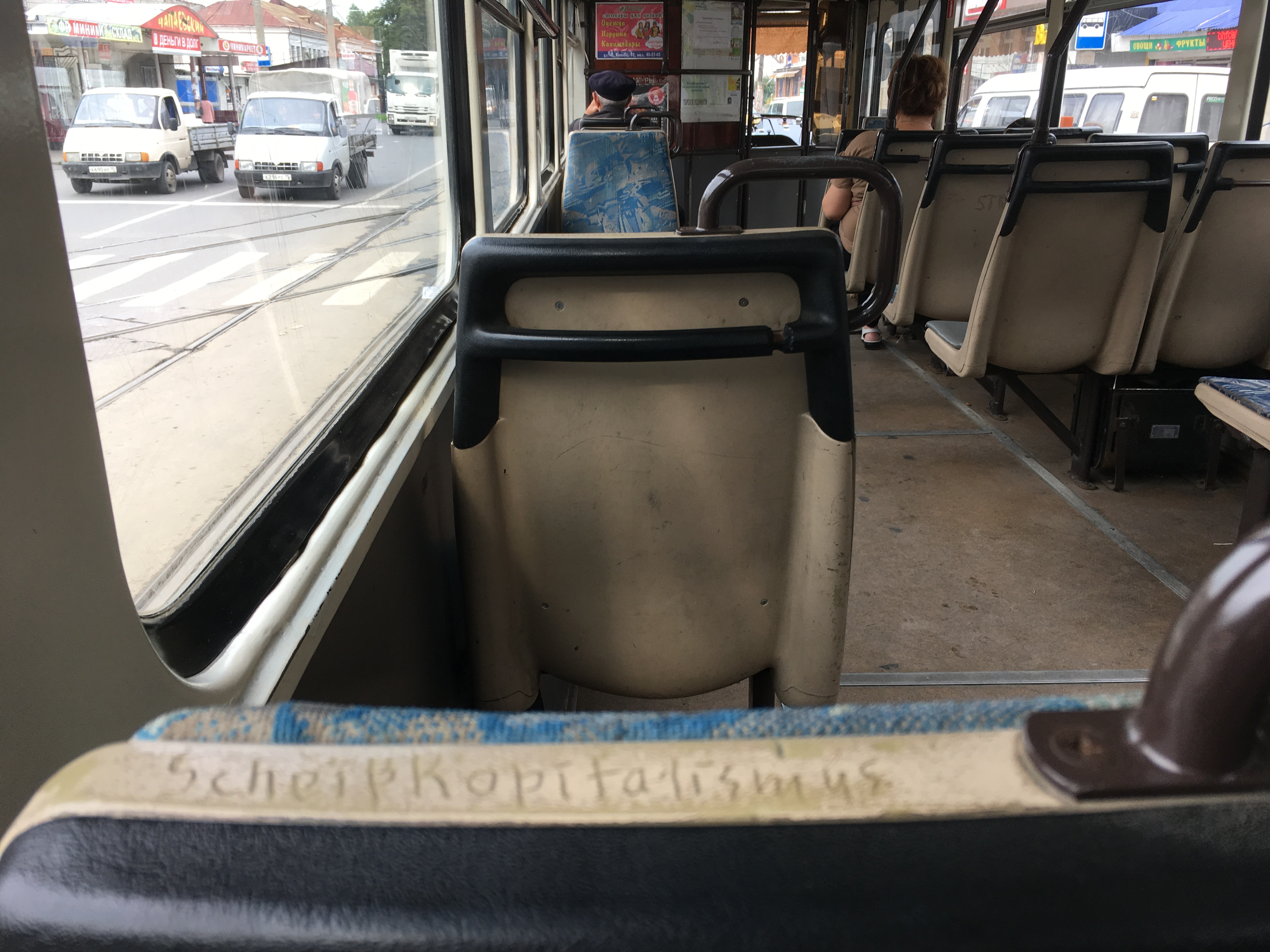 Немецкая надпись на сиденье в салоне владикавказском трамвае